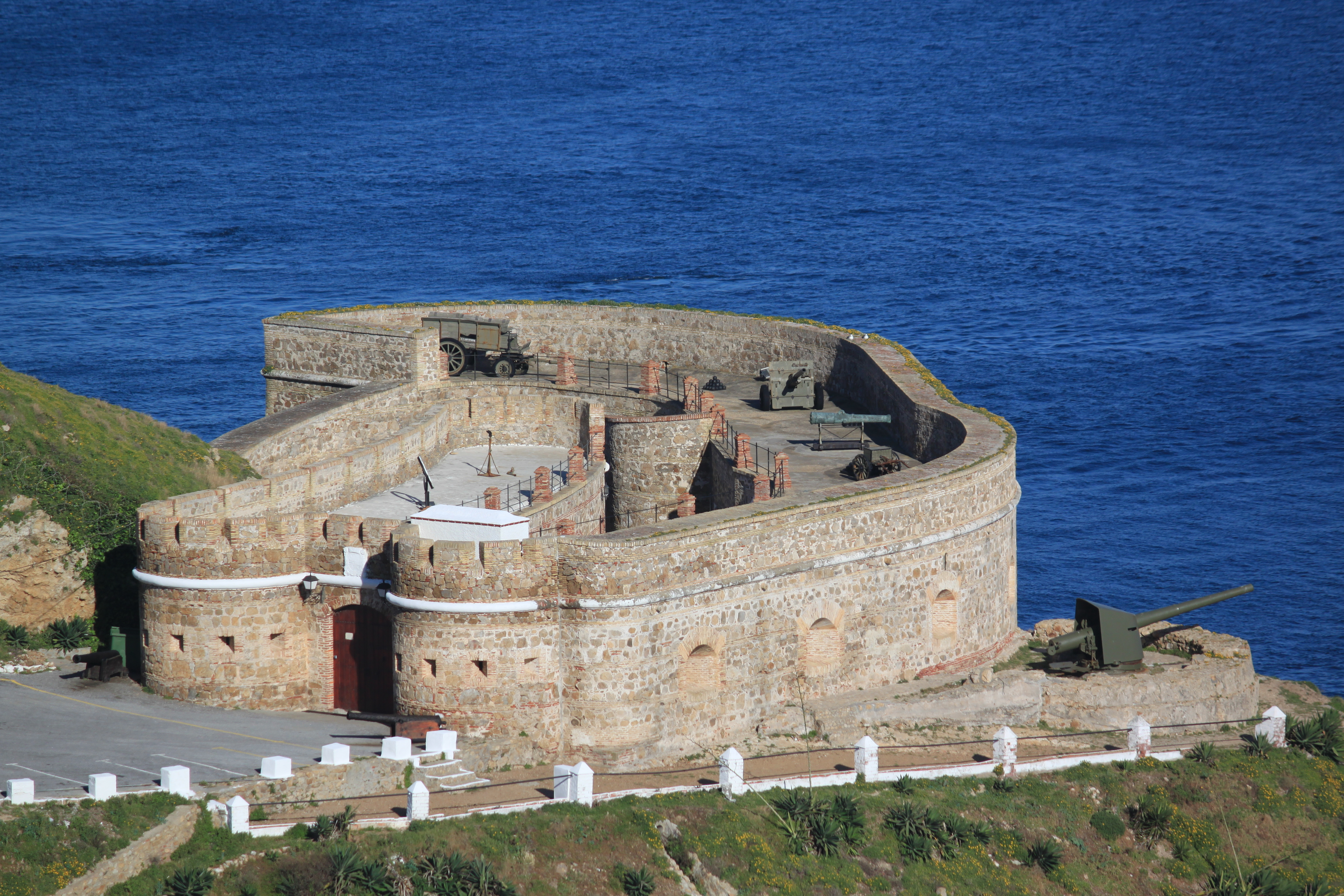 Museo militar del Desnarigado